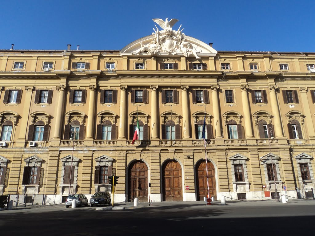 Roma, Palazzo delle Finanze. Per altre foto